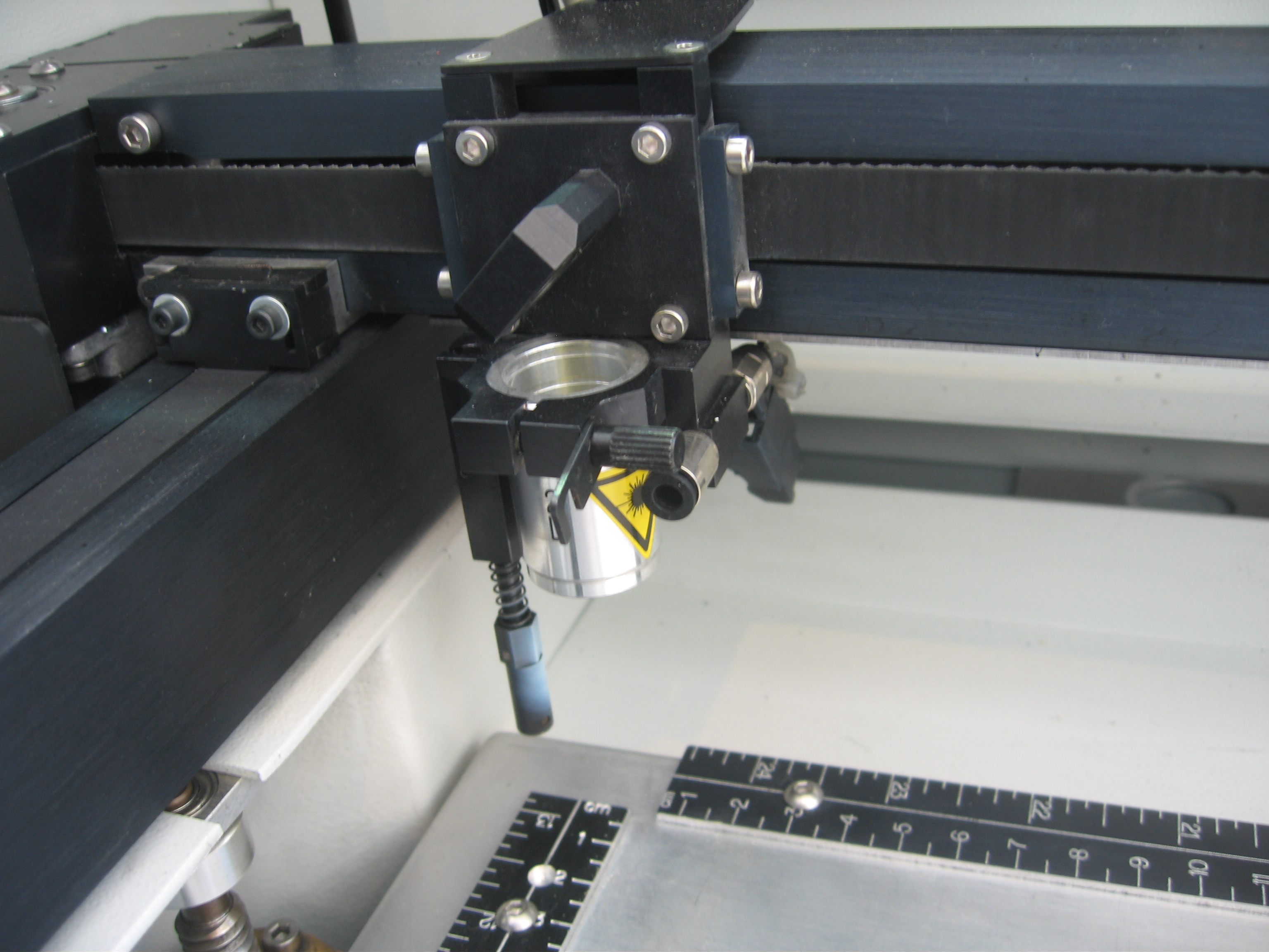 Laser engraver